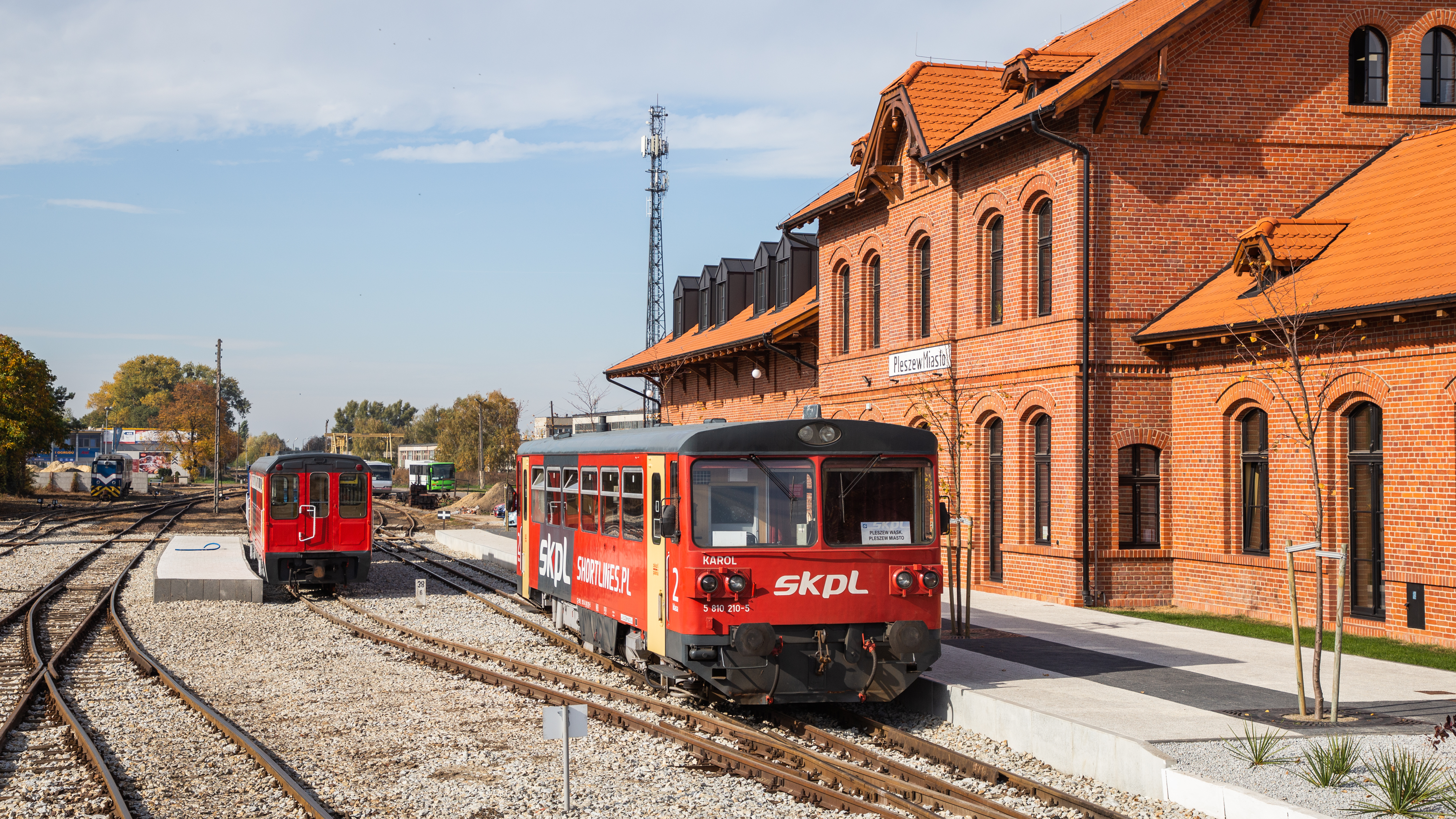 SKPL "Broodtrommel" serie 810 op station Pleszew Miasto. SKPL rijdt in opdracht van de gemeente met dit materieel een pendeldienst tussen Pleszew Wąskotorowy en Pleszew Miasto.